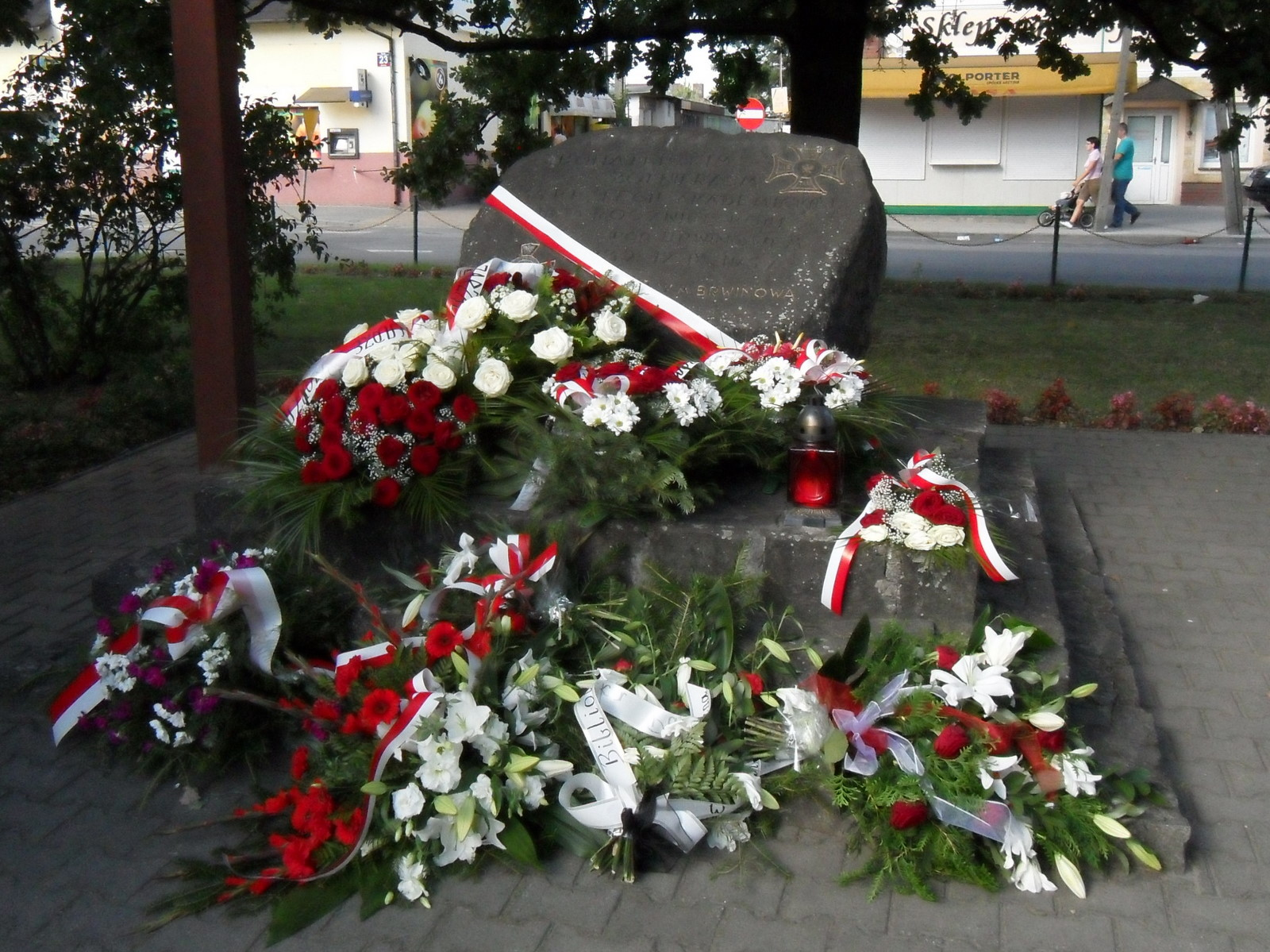 Pomnik bitwy pod Brwinowem w jej 72. rocznicę (2011)